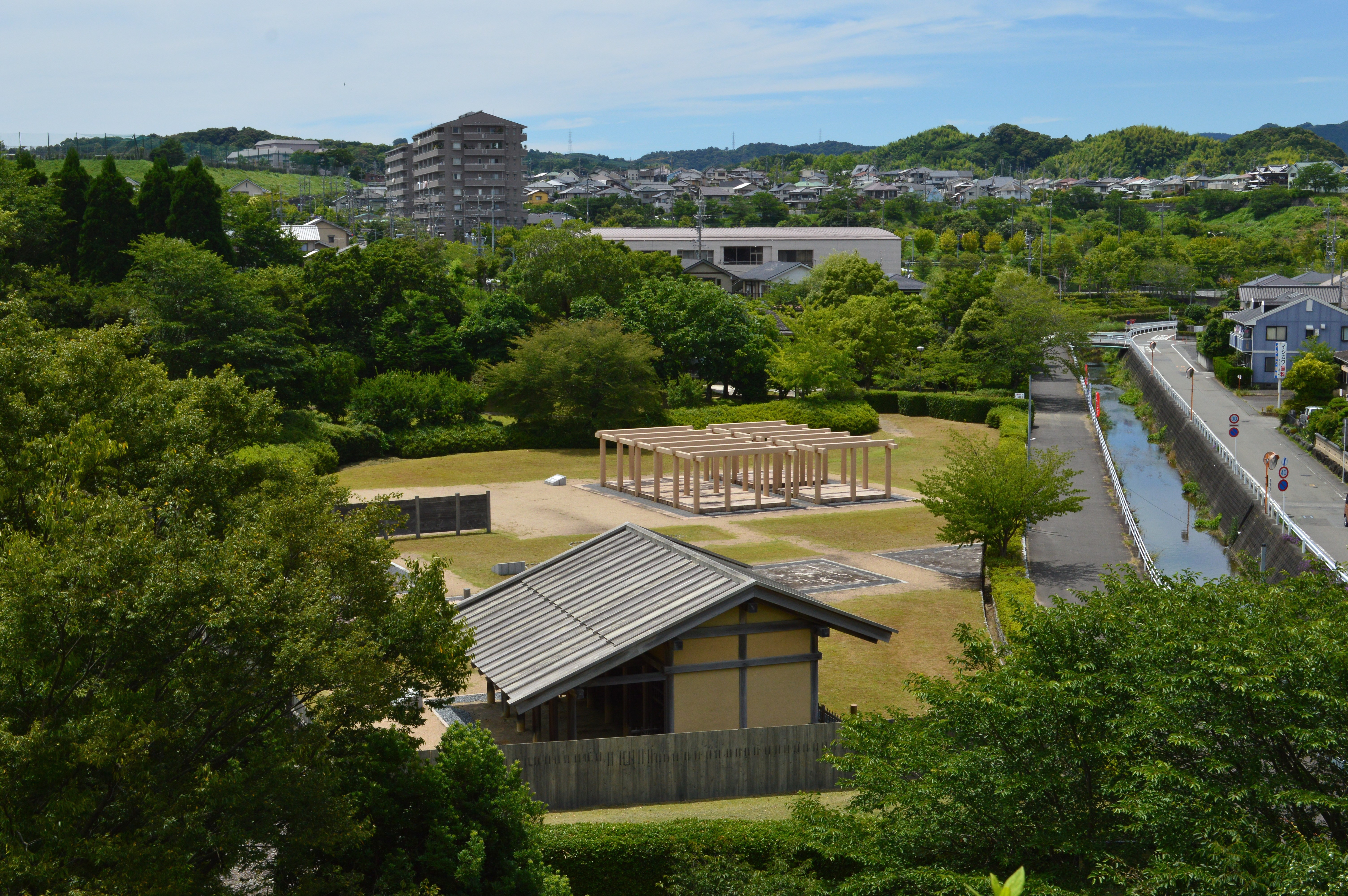 志太郡衙跡 全景